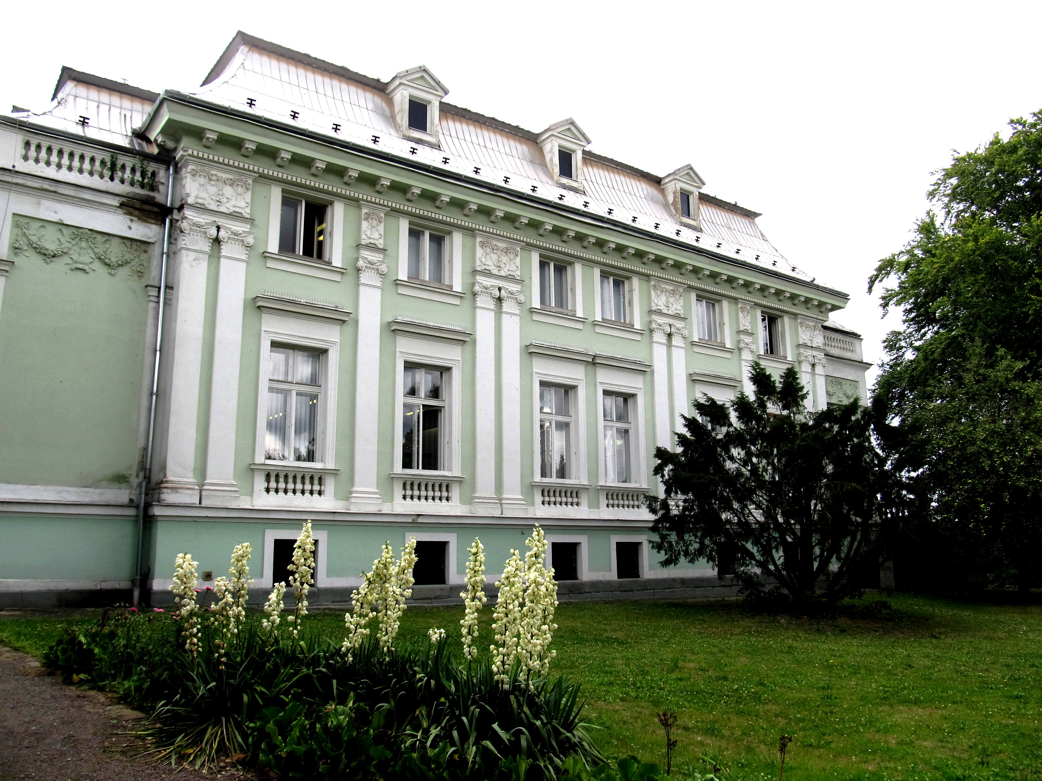 Czeicznerova vila, Nový Jičín, Husova 1151/2.